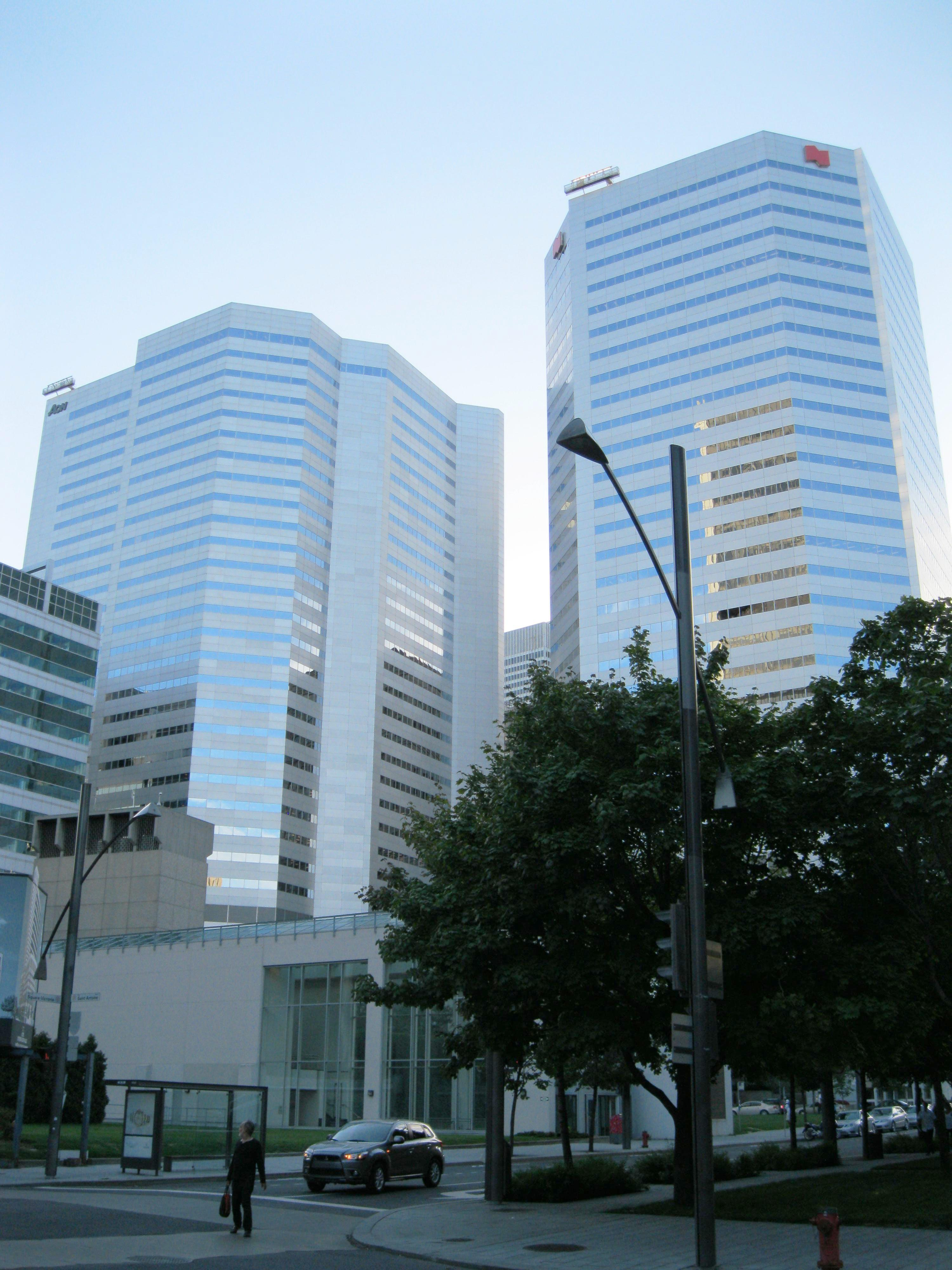 Le Complexe Maisonneuve est un ensemble de gratte-ciel à Montréal construit en 1983 sur la rue De La Gauchetière, qui rassemble : la Tour de la Banque nationale le 700 De La Gauchetière.